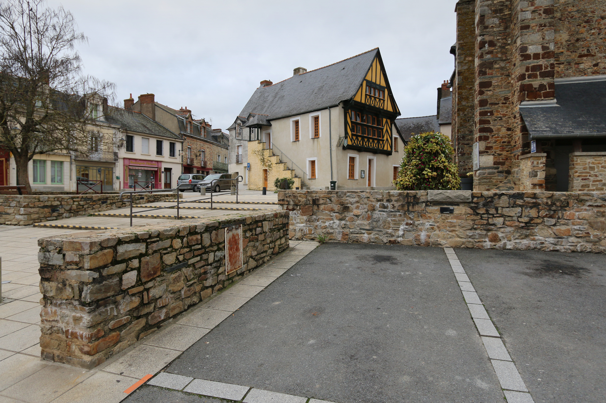 Ancienne maison de justice